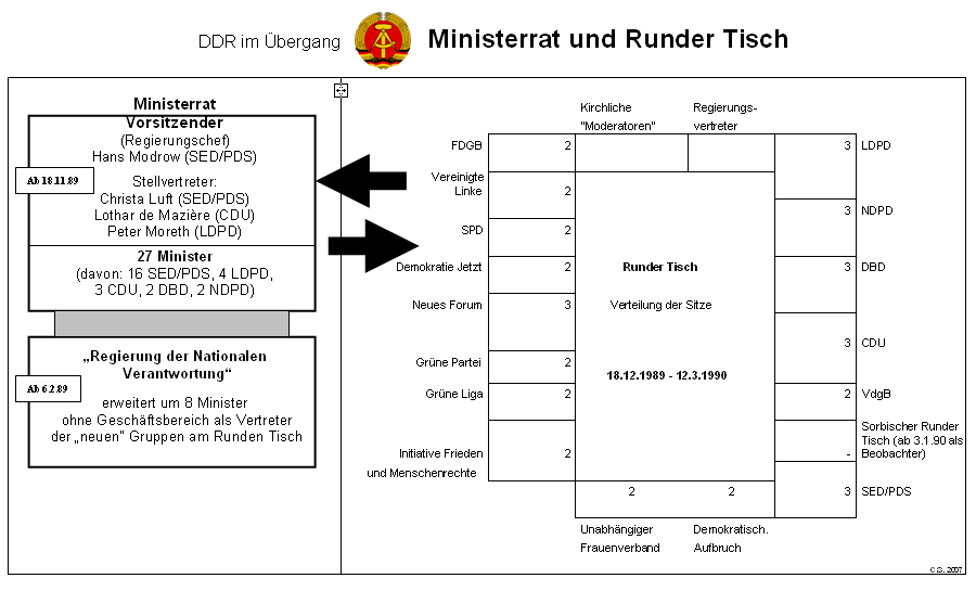 DDR im Übergang, Ministerrat und Runder Tisch